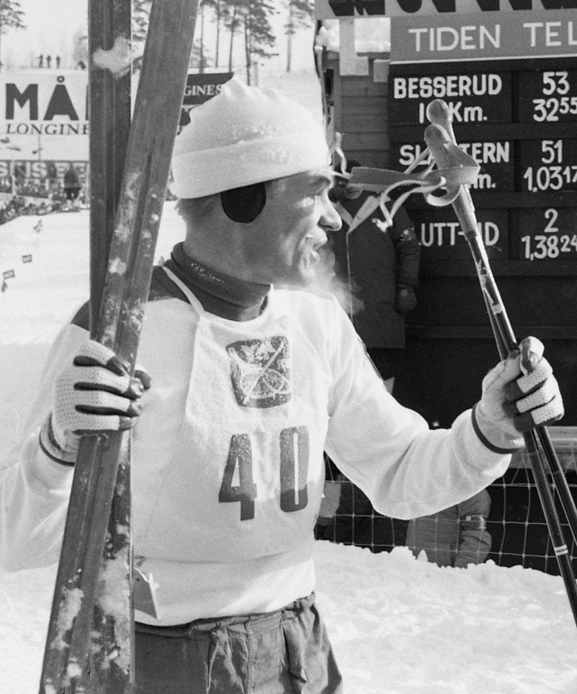 Beskrivelse: Sølvvinner Kalevi Laurila fra Finland foran resultattavla Sted: Oslo År: 1966 Fotograf: Billedbladet NÅ/ Klæboe Arkivref.: RIKSARKIVET- RA/PA/0797/U/Ua/3903_4B_7A